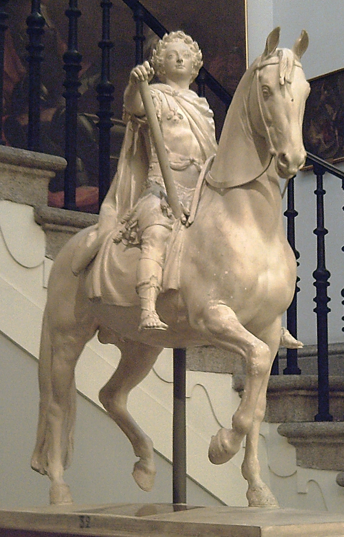 Equestrian statue of king Frederik V of Denmark